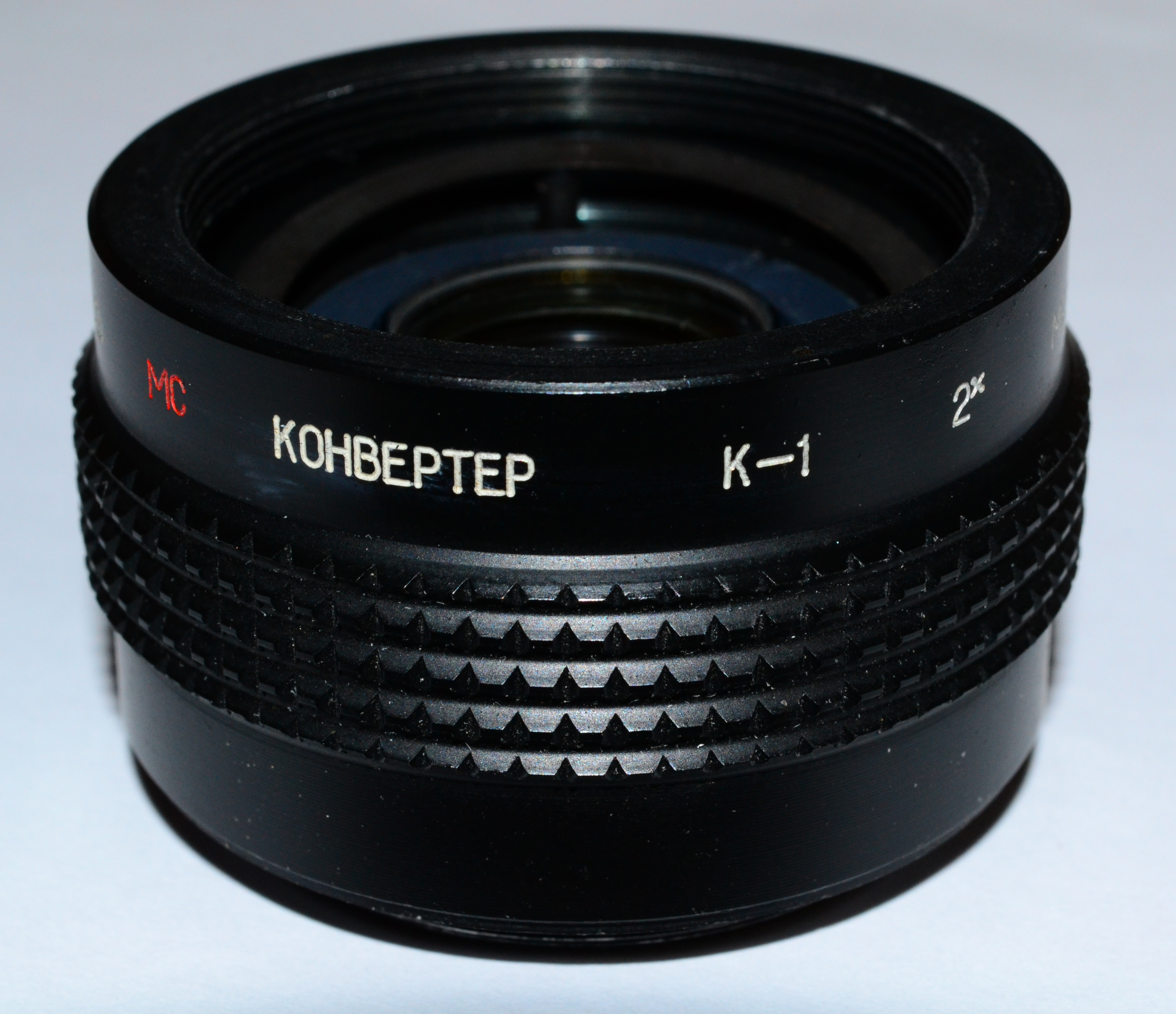 Советский Телеконвертер К-1 М42 х2 МС Техническая характеристика: - Оптическая схема: 5 элементов в 2 группах - Линейное увеличение: 2x - Рабочее расстояние системы объектив+конвертер, мм: 45,5 - Длина, мм: 39 - Наибольший диаметр, мм: 55 - Масса, кг: 0,12 - Соединение конвертера с объективом и камерой: резьбовое, М42X1